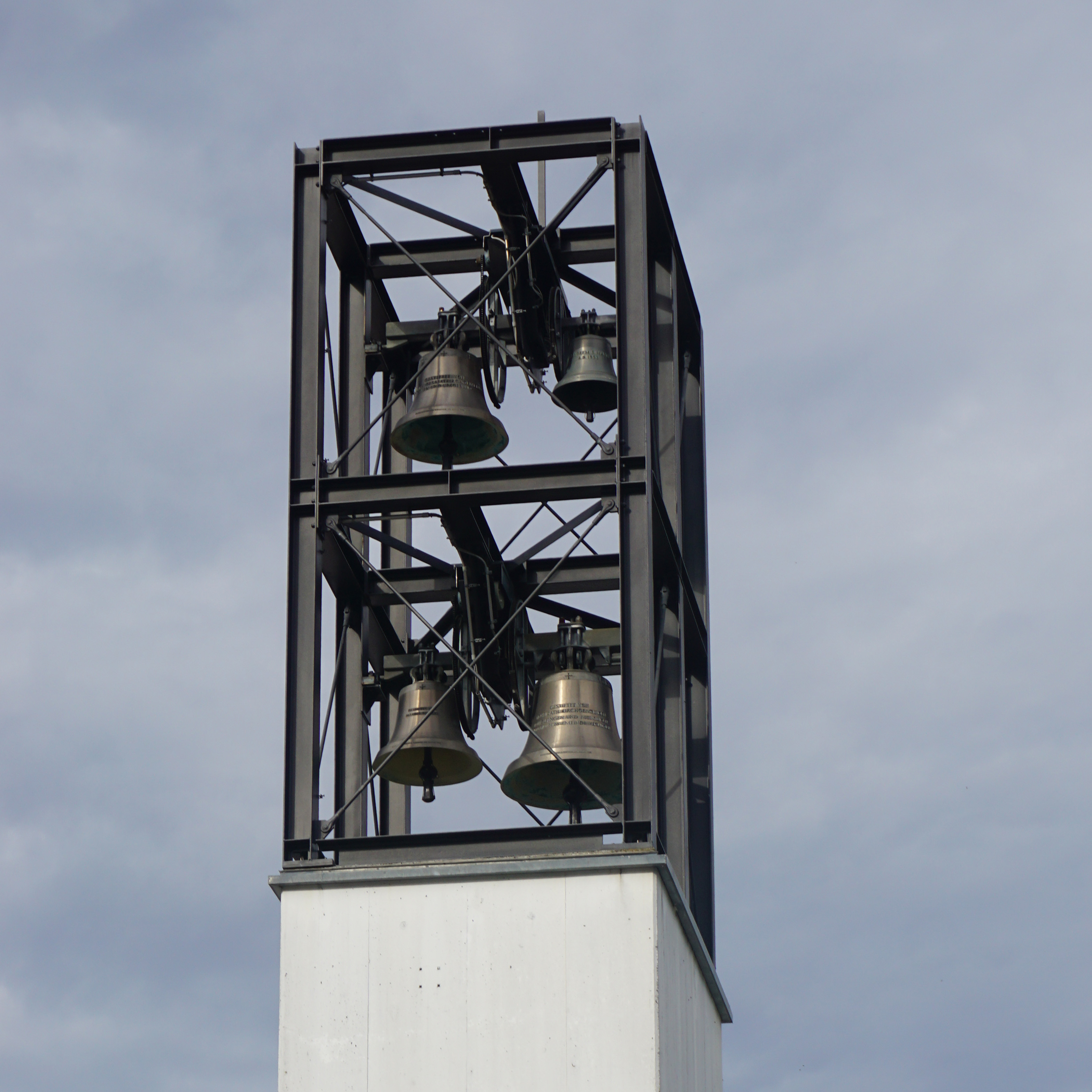 Glocken von St. Martin Worb